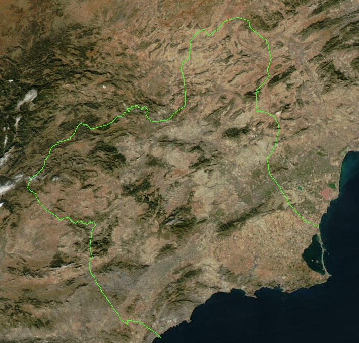 La Región de Murcia vista por satélite. Hecho por mi a partir de